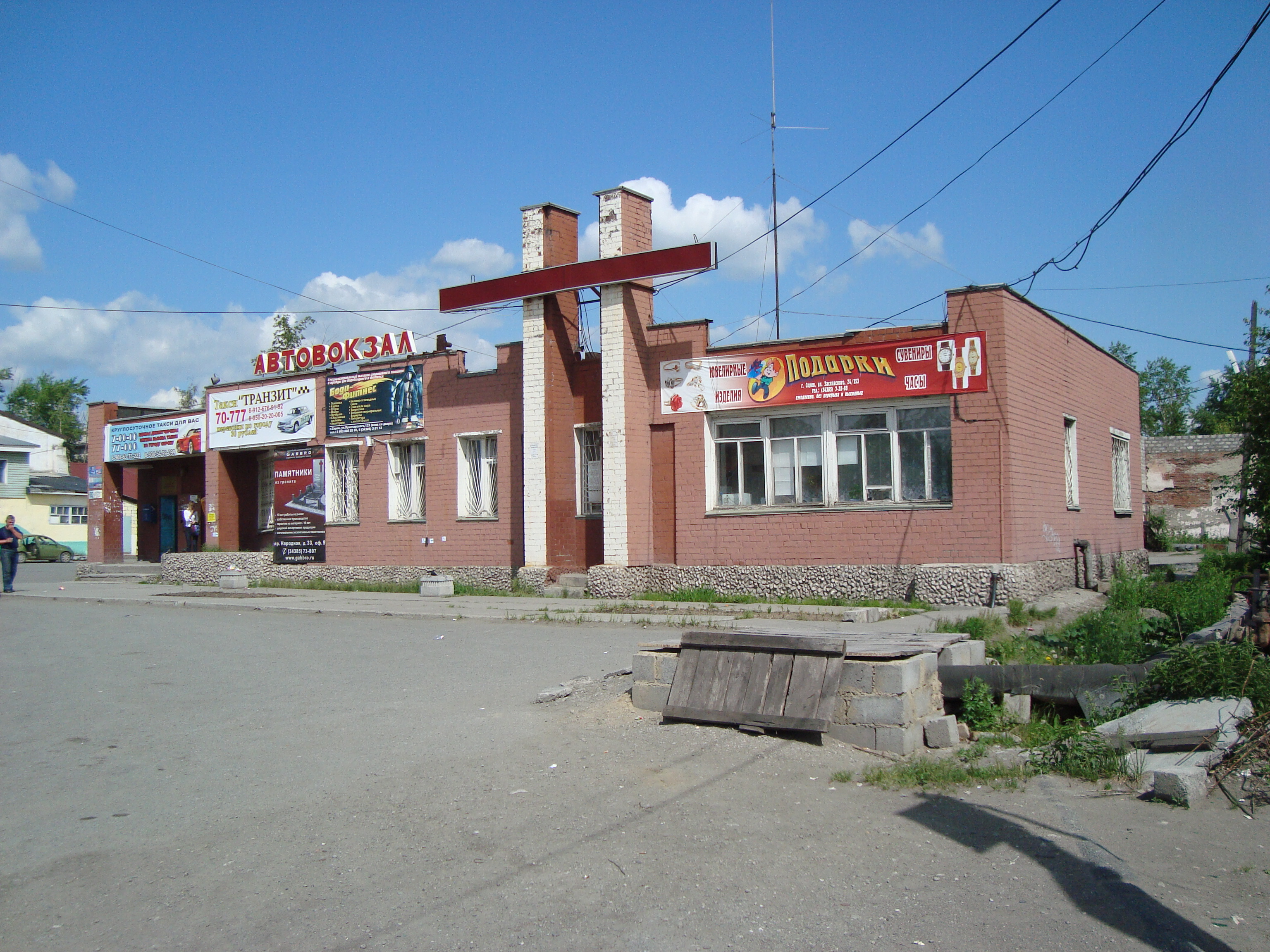 Серовский автовокзал